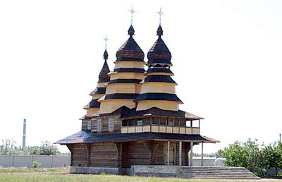 Храм святих Кирила та Методія УГКЦ у м. Херсоні (Херсонська область)